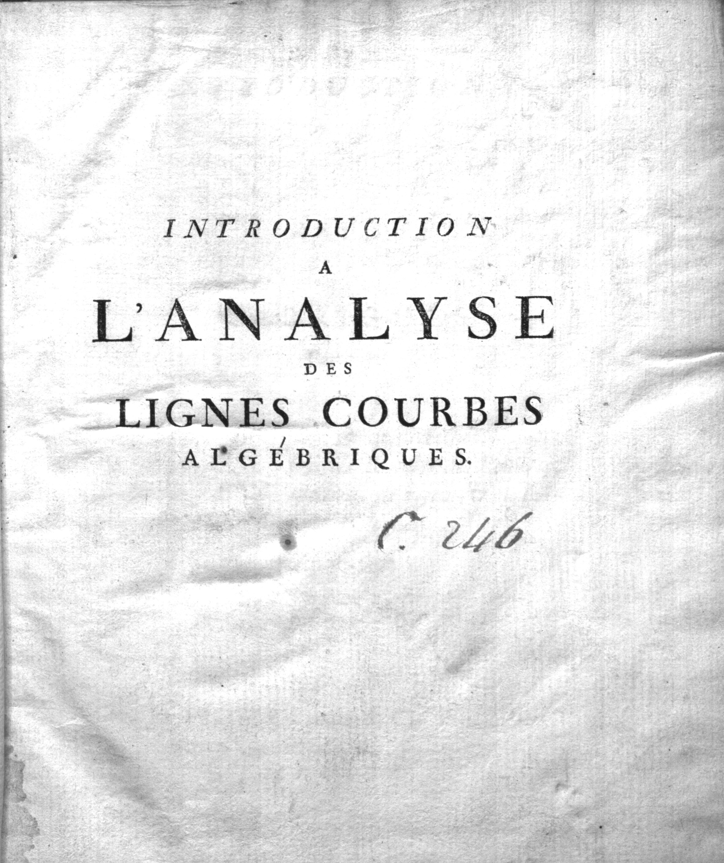 The cover sheet of Gabriel cramers book “Introduction à l’analyse des lignes courbes algébriques”.